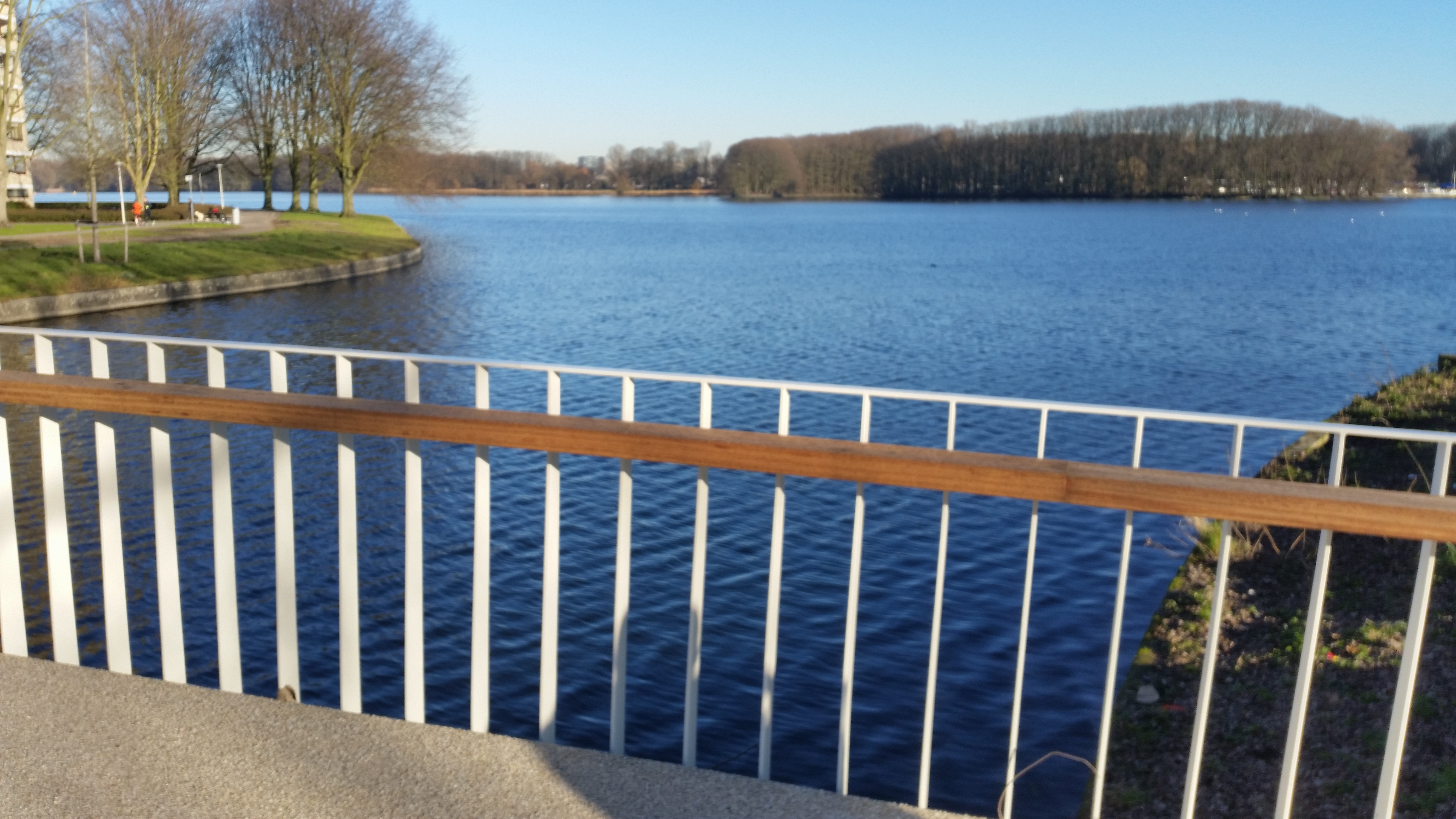 Leuning van Voetbrug Osdorpergracht met uitzicht over Sloterplas